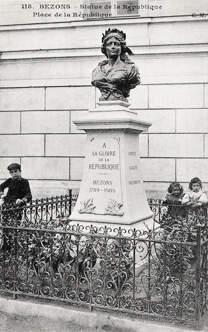 Buste République, Bezons, inauguré en 1905, détruit par l'armée allemande sous l'Occupation